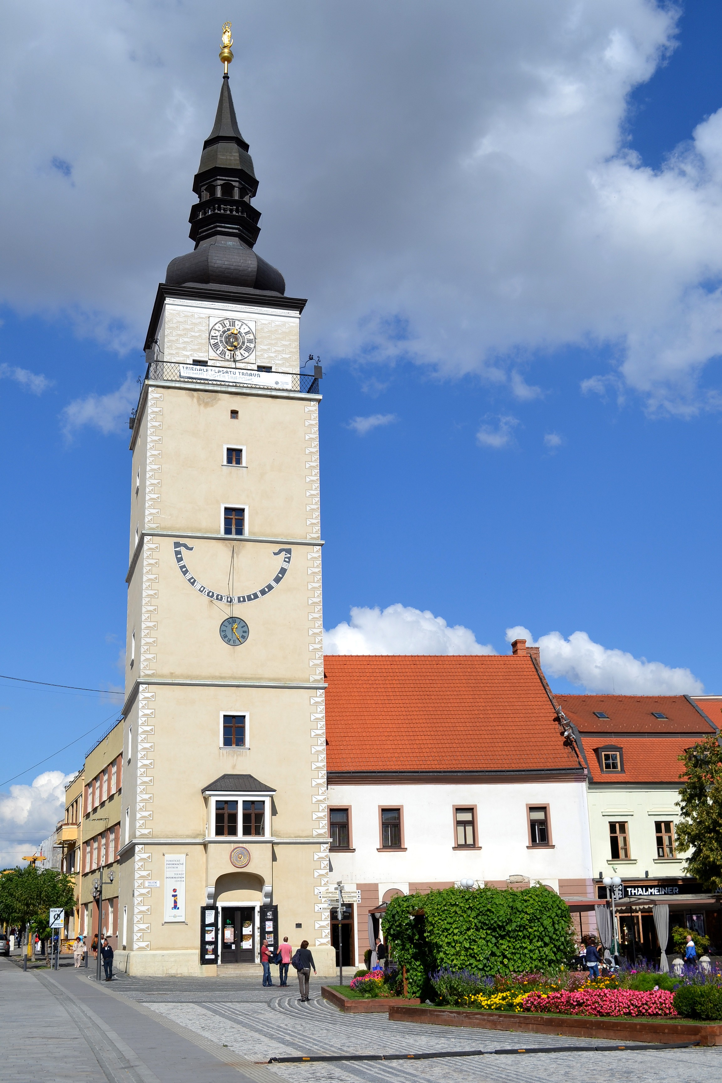 Trnava, mestská veža